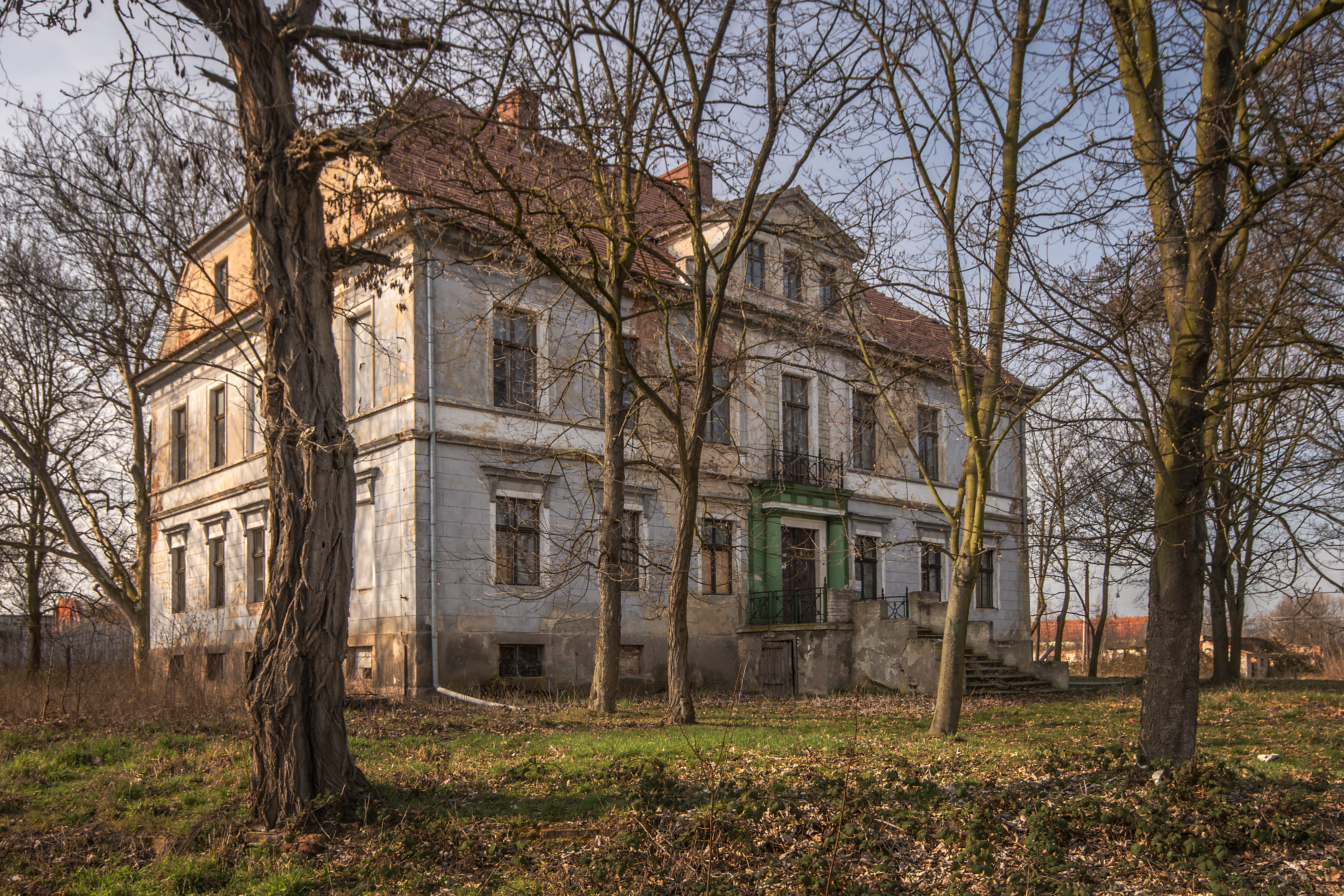 Rogoźnik 12, pałac, XVIII, 2 poł. XIX